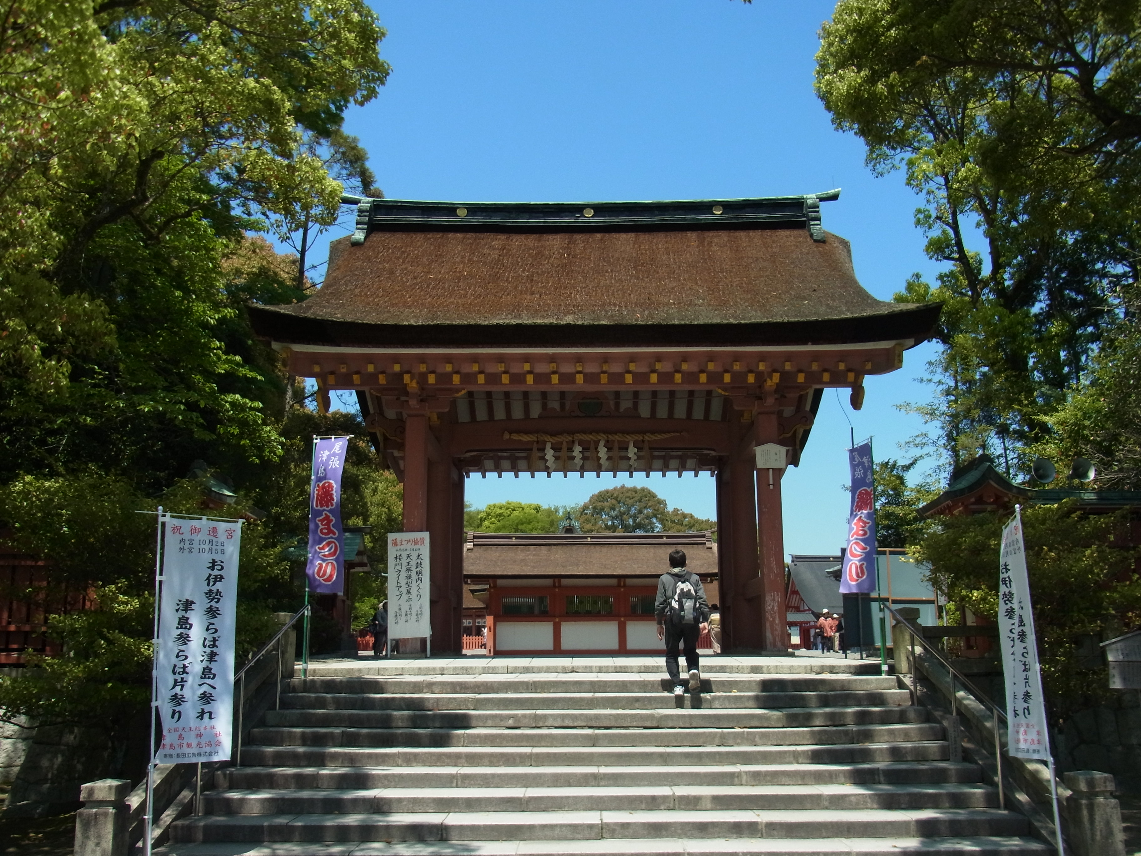 津島神社南門